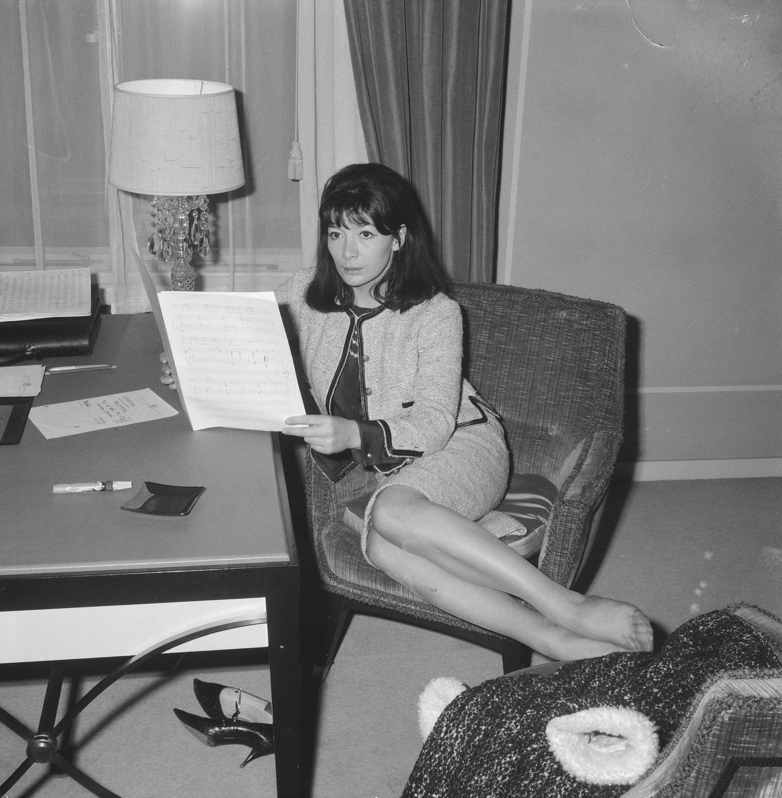 Collectie / Archief : Fotocollectie Anefo Reportage / Serie : [ onbekend ] Beschrijving : Juliette Greco in het Amstel Hotel Datum : 25 januari 1962 Locatie : Amsterdam, Noord-Holland Trefwoorden : zangeressen Persoonsnaam : Greco, Juliette Instellingsnaam : Amstelstation Fotograaf : Nijs, Jac. de / Anefo Auteursrechthebbende : Nationaal Archief Materiaalsoort : Negatief (zwart/wit) Nummer archiefinventaris : bekijk toegang 2.24.01.03 Bestanddeelnummer : 913-4436